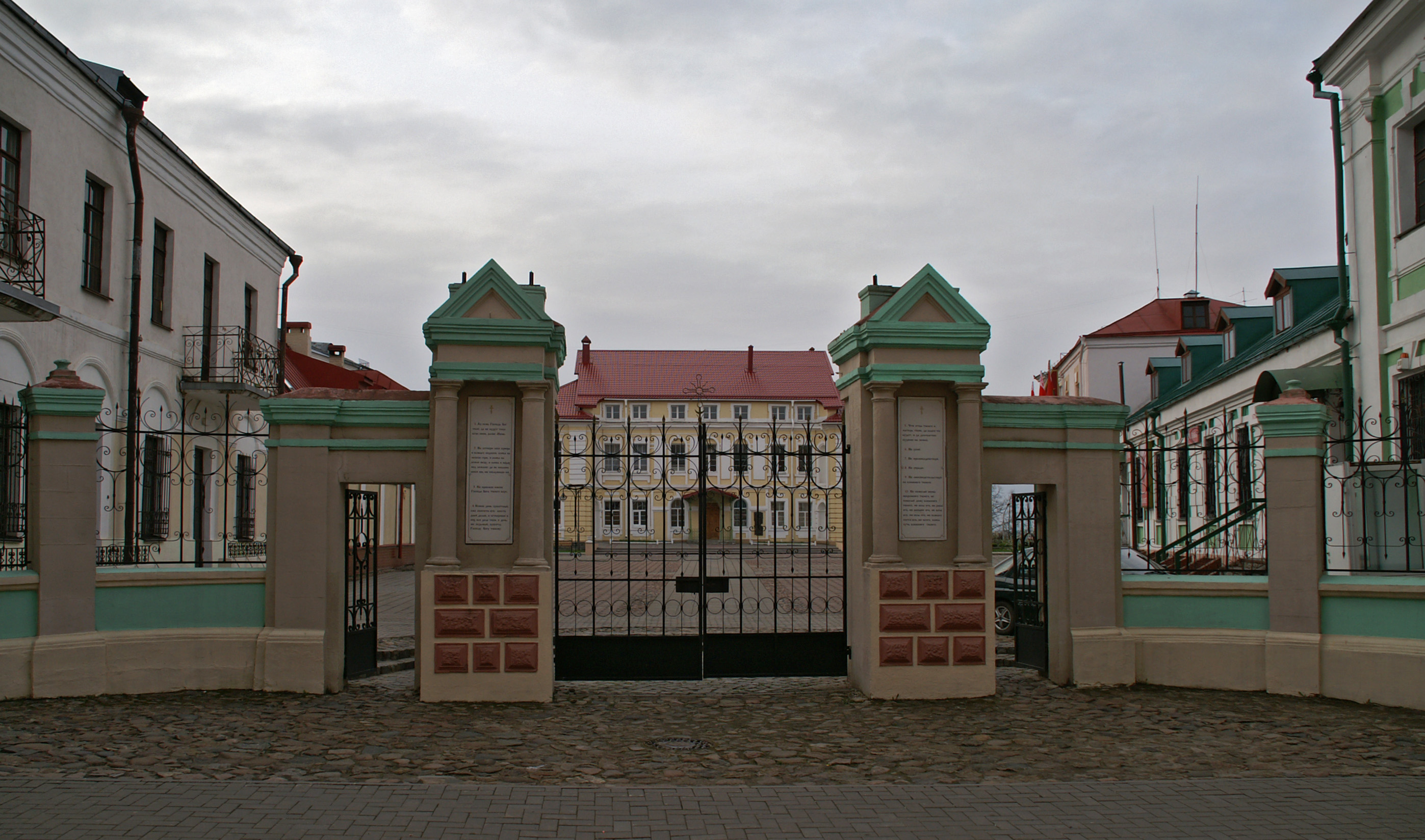 Беларуская (тарашкевіца): Былы архірэйскі палац. г. Магілёў This is a photo of Belarusian heritage monument. Reference number: 511Г000025 ( WLM)